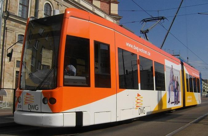 Straßenbahn NGT6DE 310 am Museum in Dessau, Deutschland.